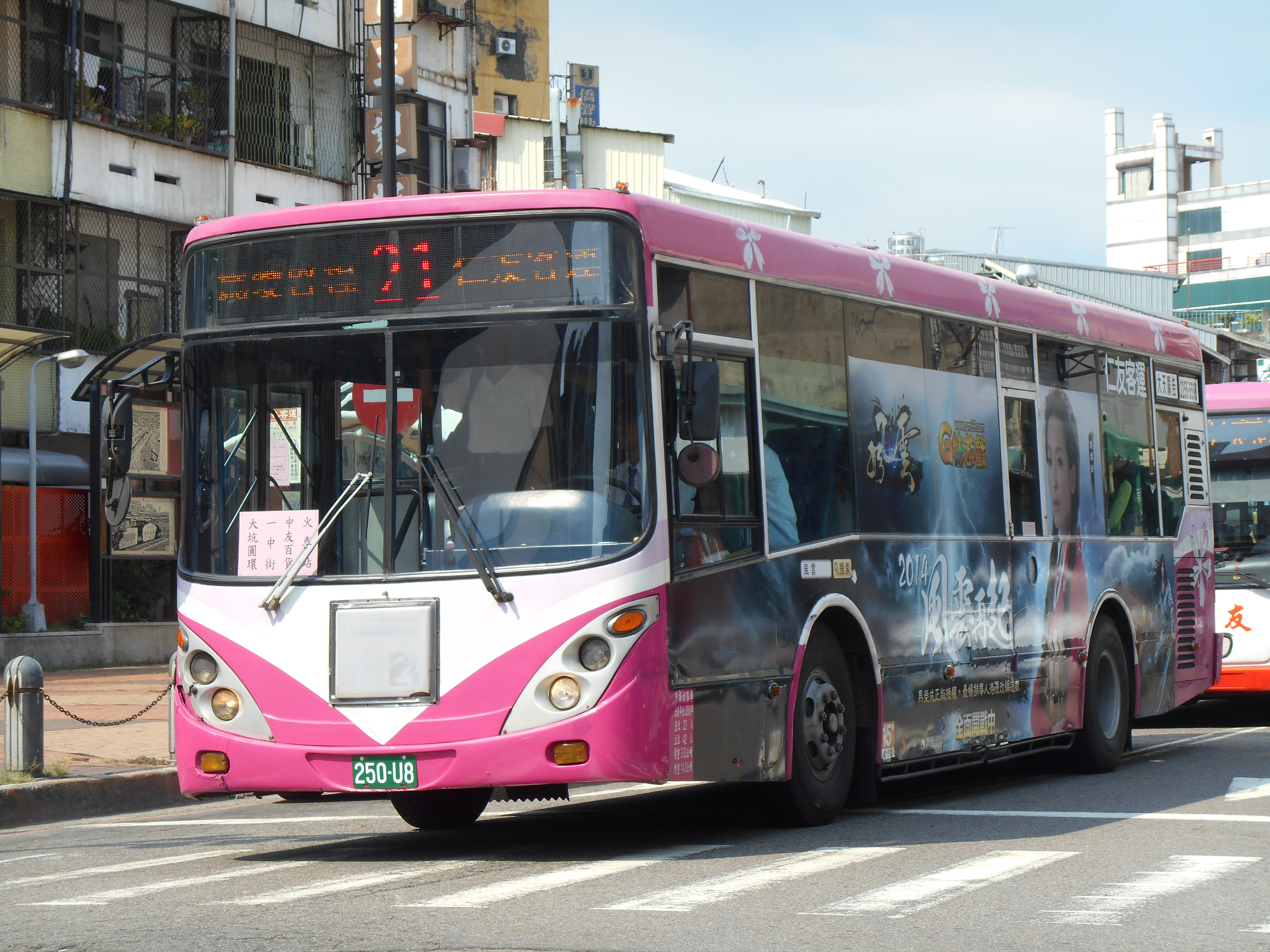 中文（台灣）: 仁友客運2006年原臺北客運日野ERK2JML櫻花車250-U8行駛臺中市公車21路。